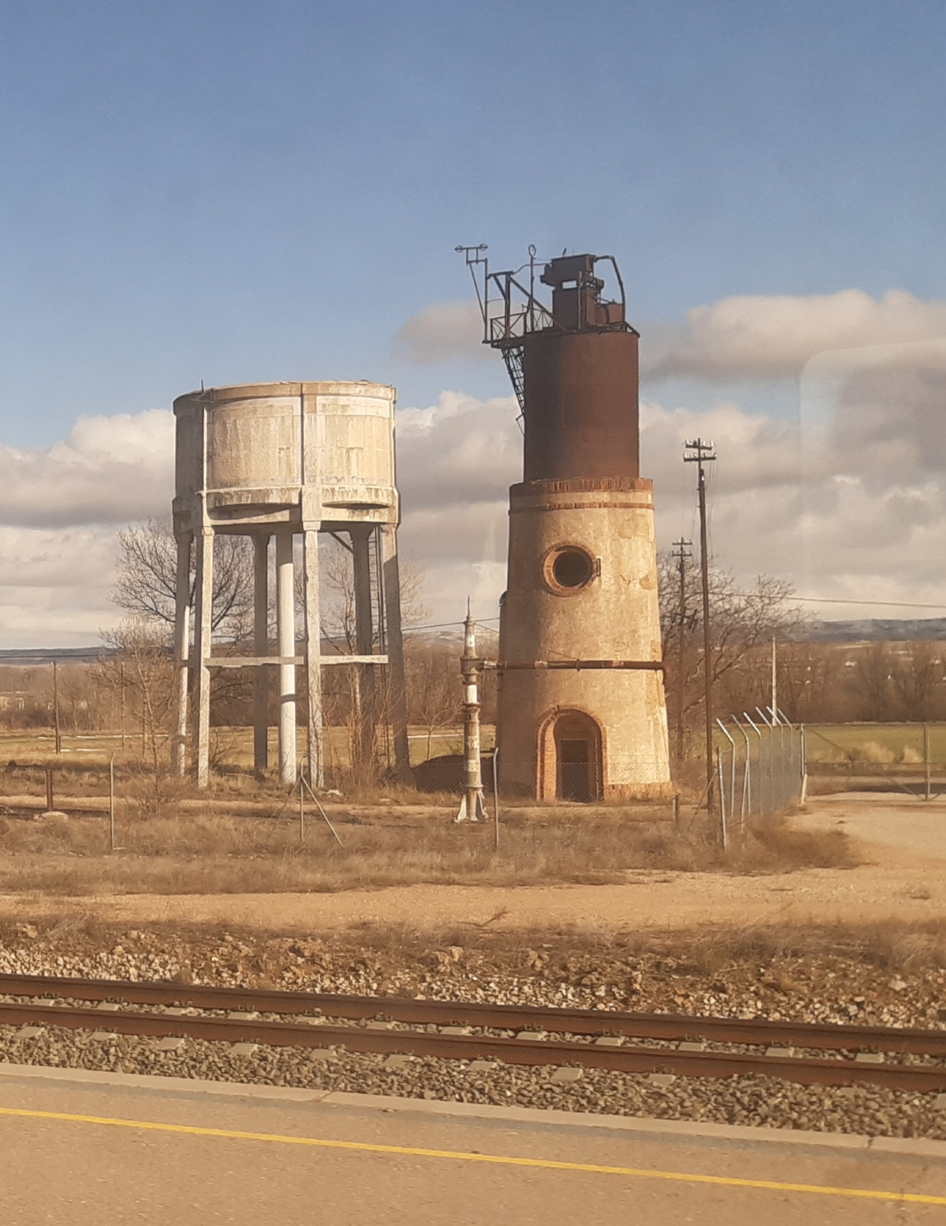 Depósito de agua, acopio de agua para locomotoras y descalcificadora de agua en la antigua estación de Caminreal-Fuentes Claras, puestos en funcionamiento en 1933 hasta el fin del uso de las locomotoras de vapor.